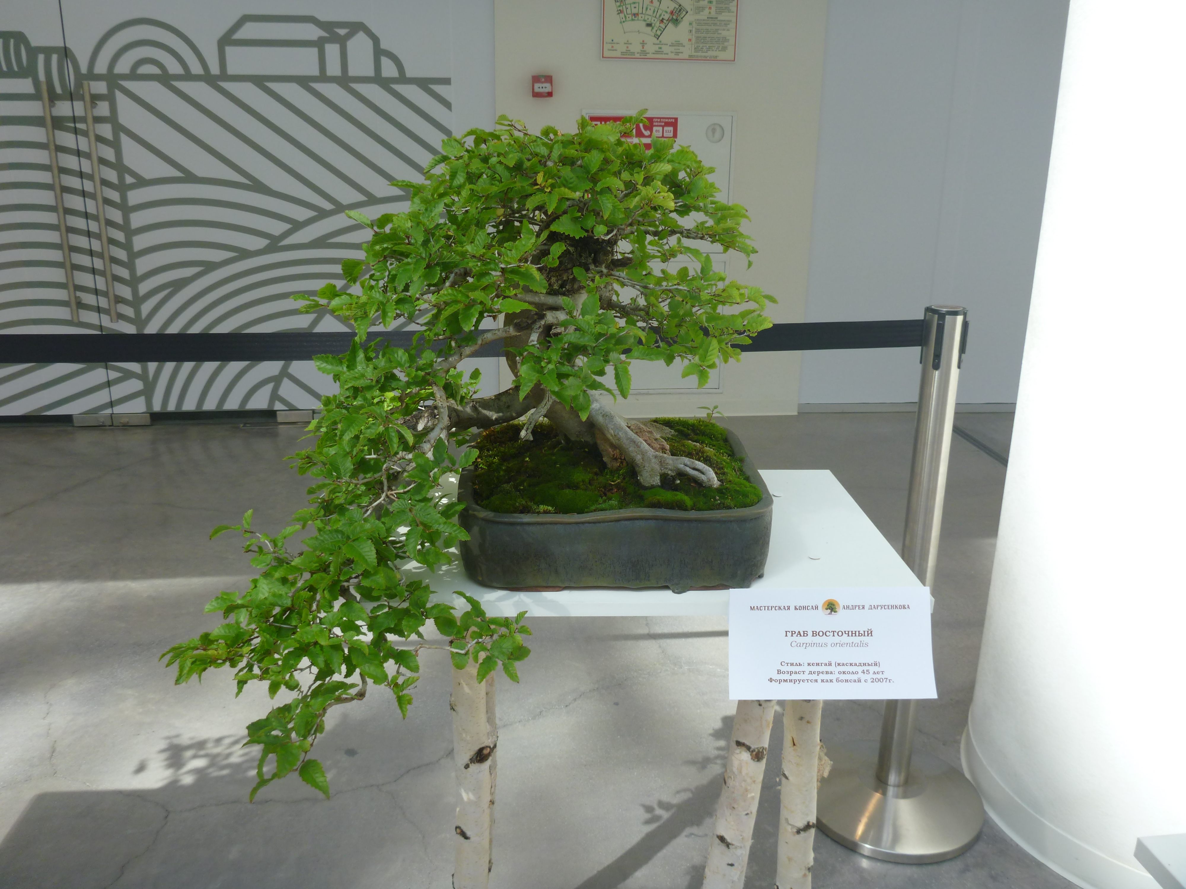 Граб восточный бонсай Ельцин-центр 2019 год